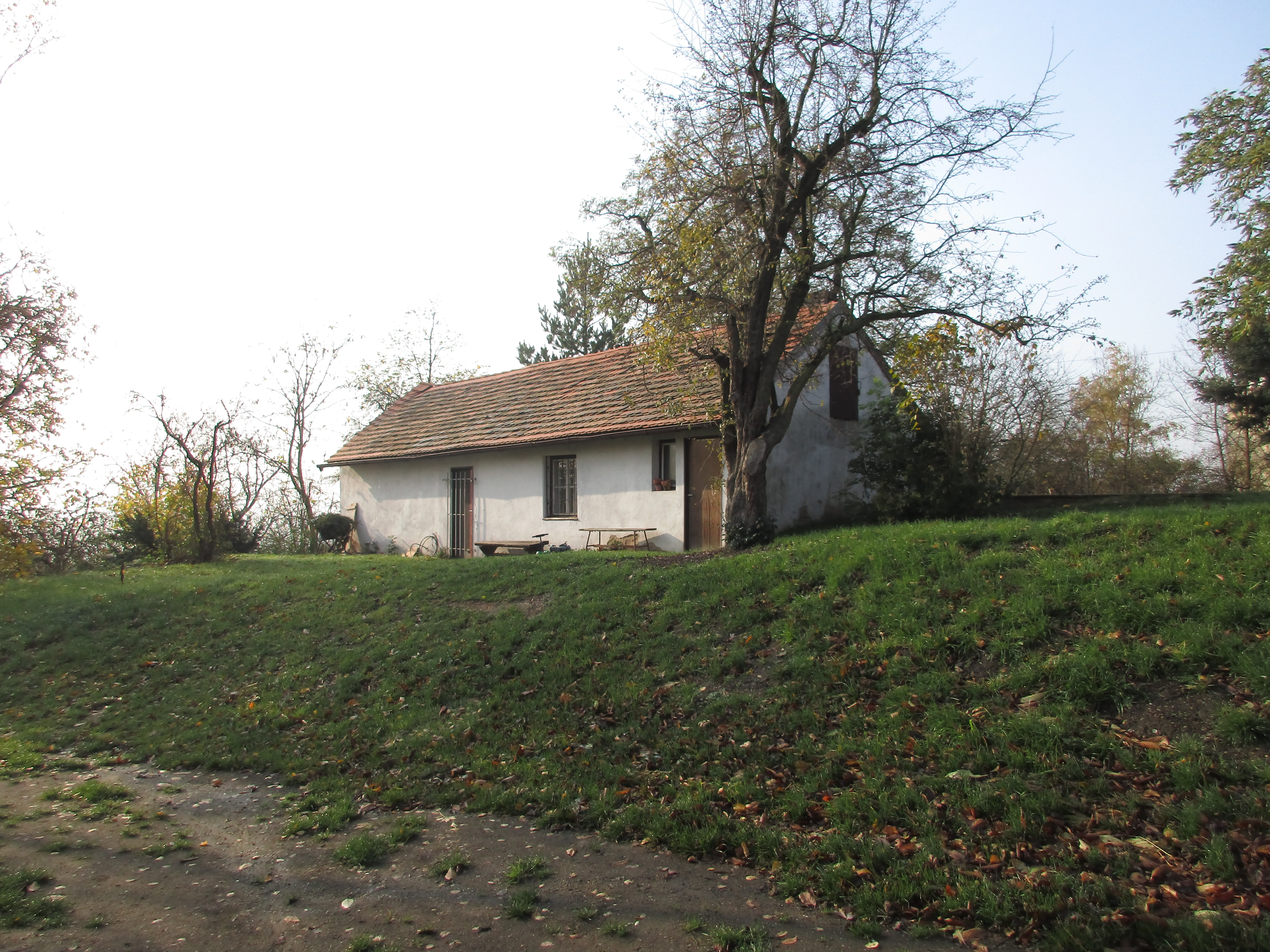 U Habrovky 2/66, Praha 4-Krč.